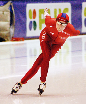 Maren Haugli. World Cup, speedskating. Heerenveen February 2009.